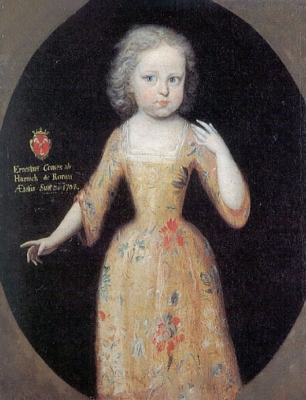 Johann Ernst (1705-1739), der 7. Sohn des Aloys Thomas von Harrach und der Cäcilia von Thannhausen, wurde Propst zu Altbunzlau, Abt zu "unserer lieben Frau Mariä" in Dötmös, Domherr und Kapitular in Salzburg und Passau. Er bekleidete weiters das Amt eines kaiserlichen Geheimrats und wurde Kaiser Karls VI. bevollmächtigter Minister am Papsthof zu Rom. 1737 erlangte er die Bischofswürde in Neutra/Ungarn. Johann Ernst ist auf diesem Bild, wie alle anderen kleinen Knaben seiner Zeit, wie ein Mädchen gekleidet. Das geblümte goldfarbene Kleid ist mit einem tiefen Halsausschnitt versehen, und Johann Ernst trägt ein Fischbeinmieder. Nur die Inschrift und die Frisur verraten, daß es sich hier um einen Buben handelt.